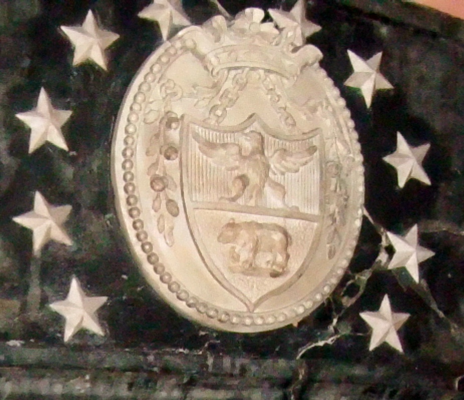 Franz Maria Schweitzer (1722-1812), Bauherr des Palais Schweitzer, des nachmaligen Hotel "Russischer Hof", Frankfurter Handelsherr, Wappen vom Epitaph im Kaiserdom Frankfurt